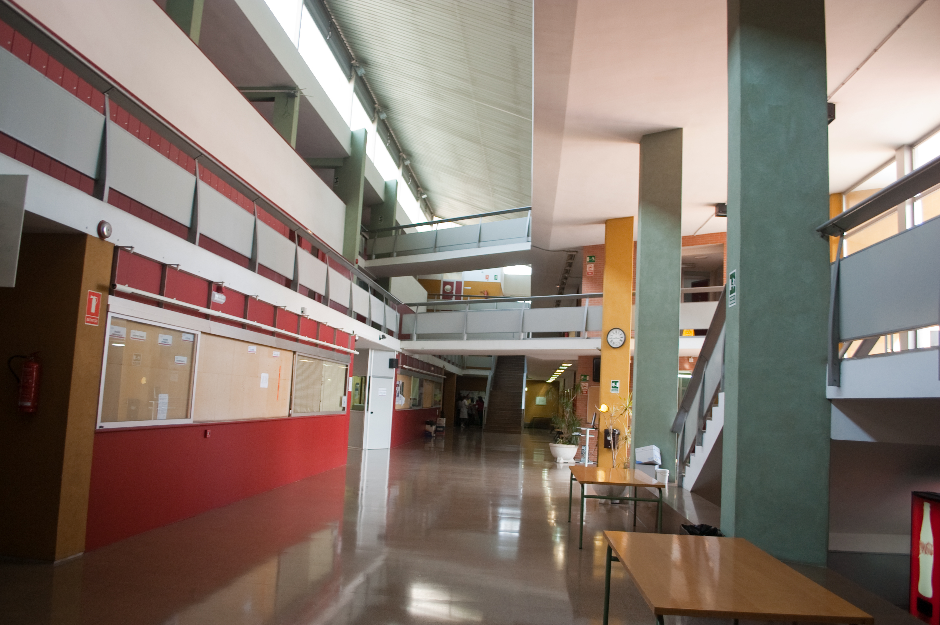 Vista del atrio interno del CIPFP Ausiàs March